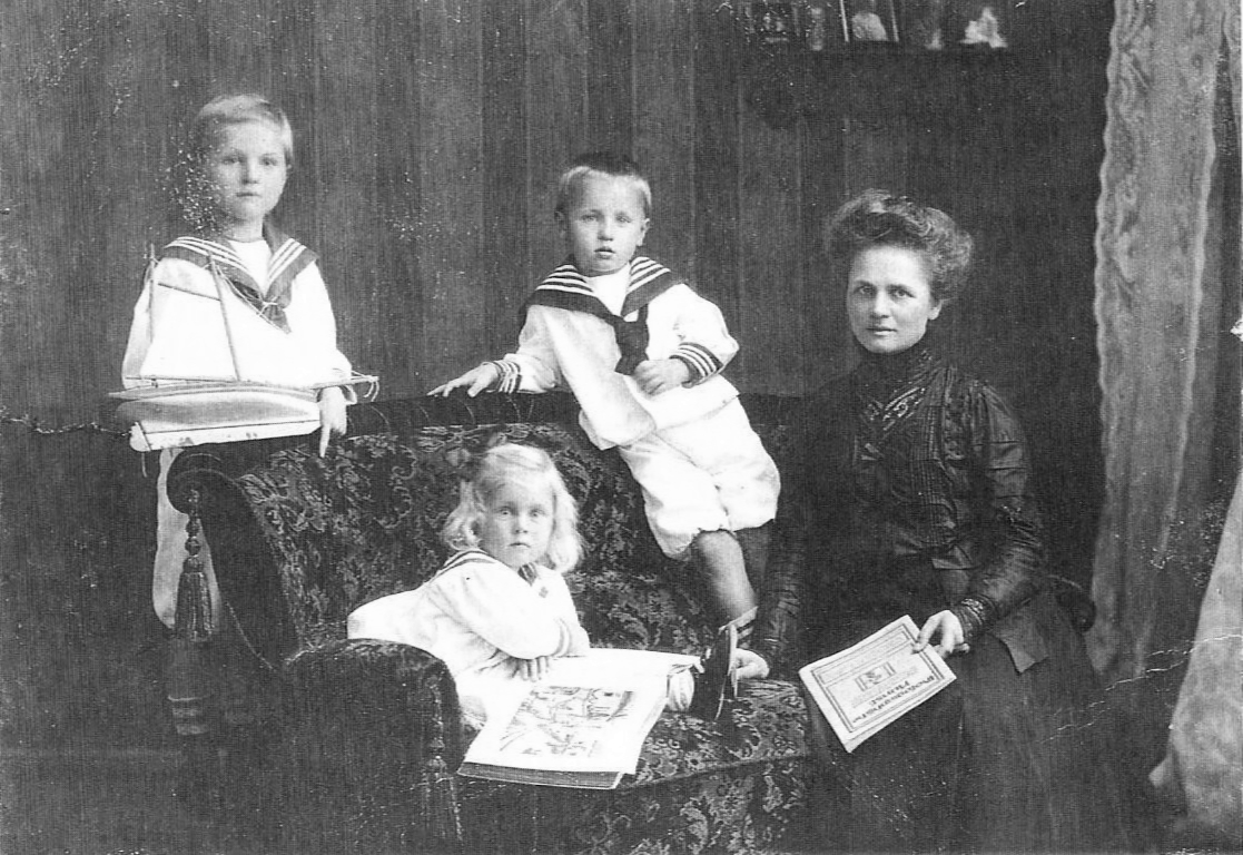 Gerhard, Johannes, Mutter Elisabeth und Reinhilde Wolburg 1910